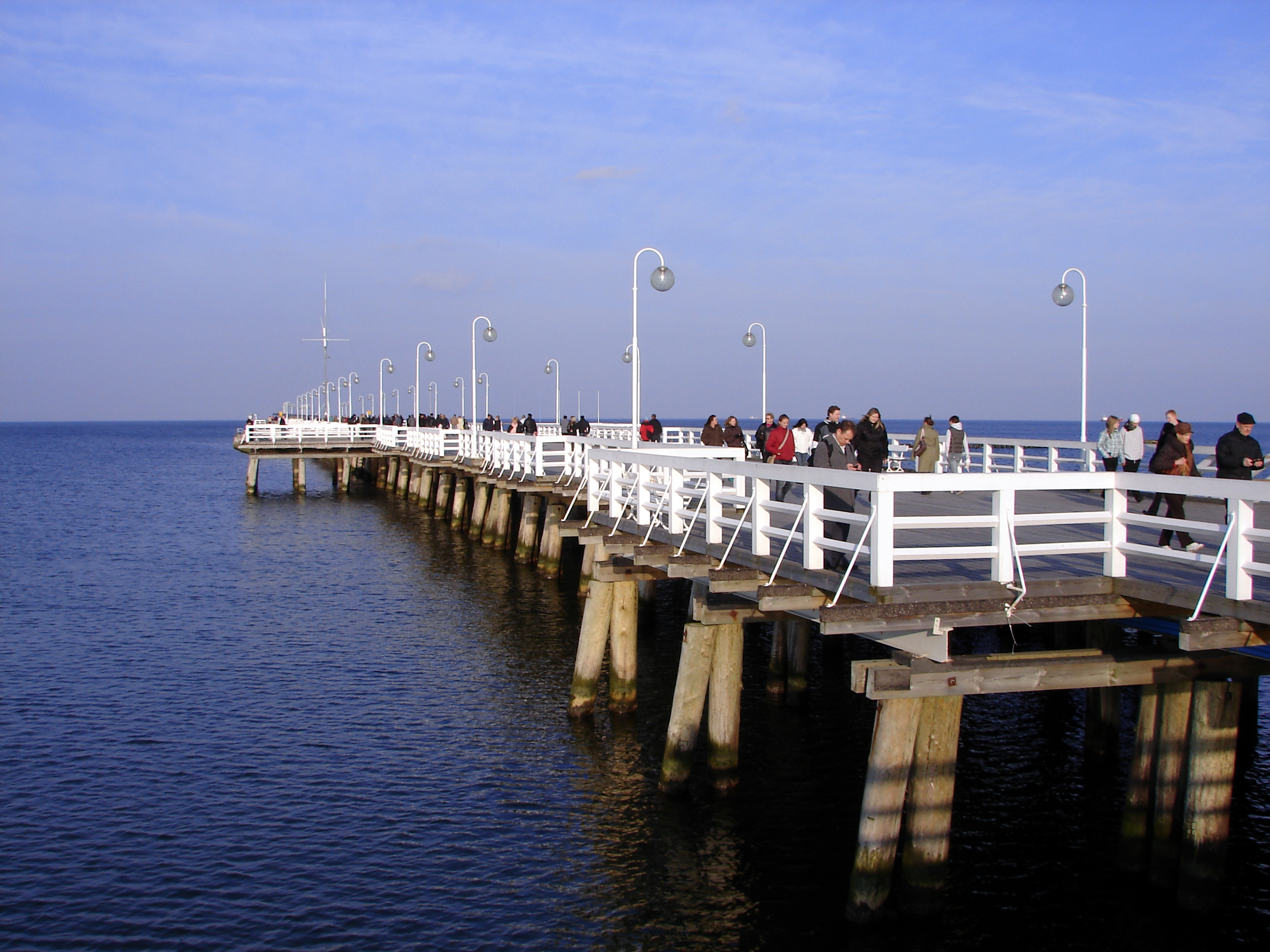 Drewnianie molo w Sopocie, najdłuższe w Europie